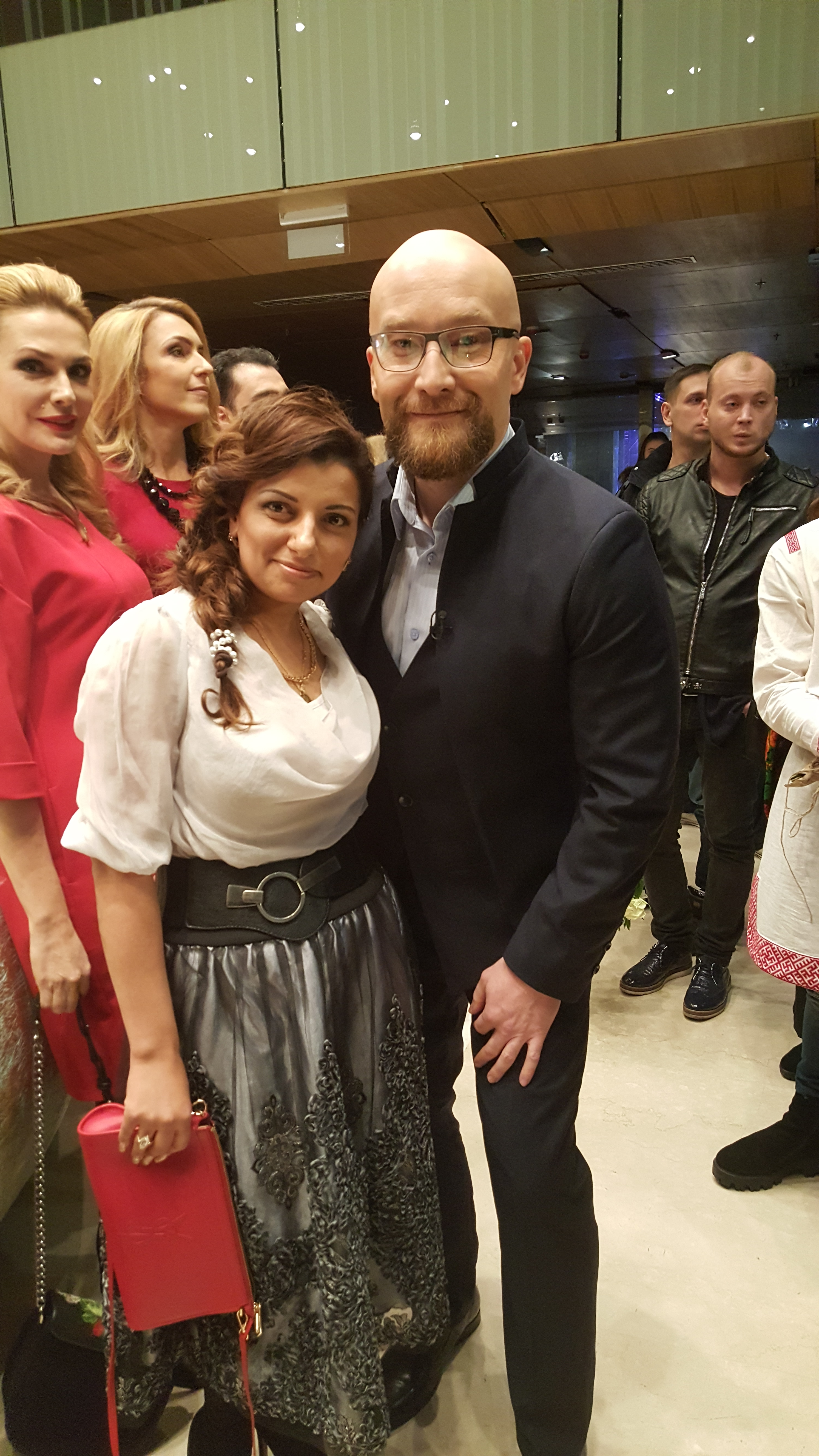 Слева - Рубина Цыбульская, справа - Павел Костицын (ведущий "Битвы Экстрасенсов")